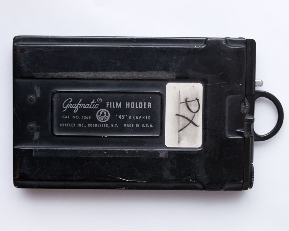 Graflex Grafmatic Film Holder